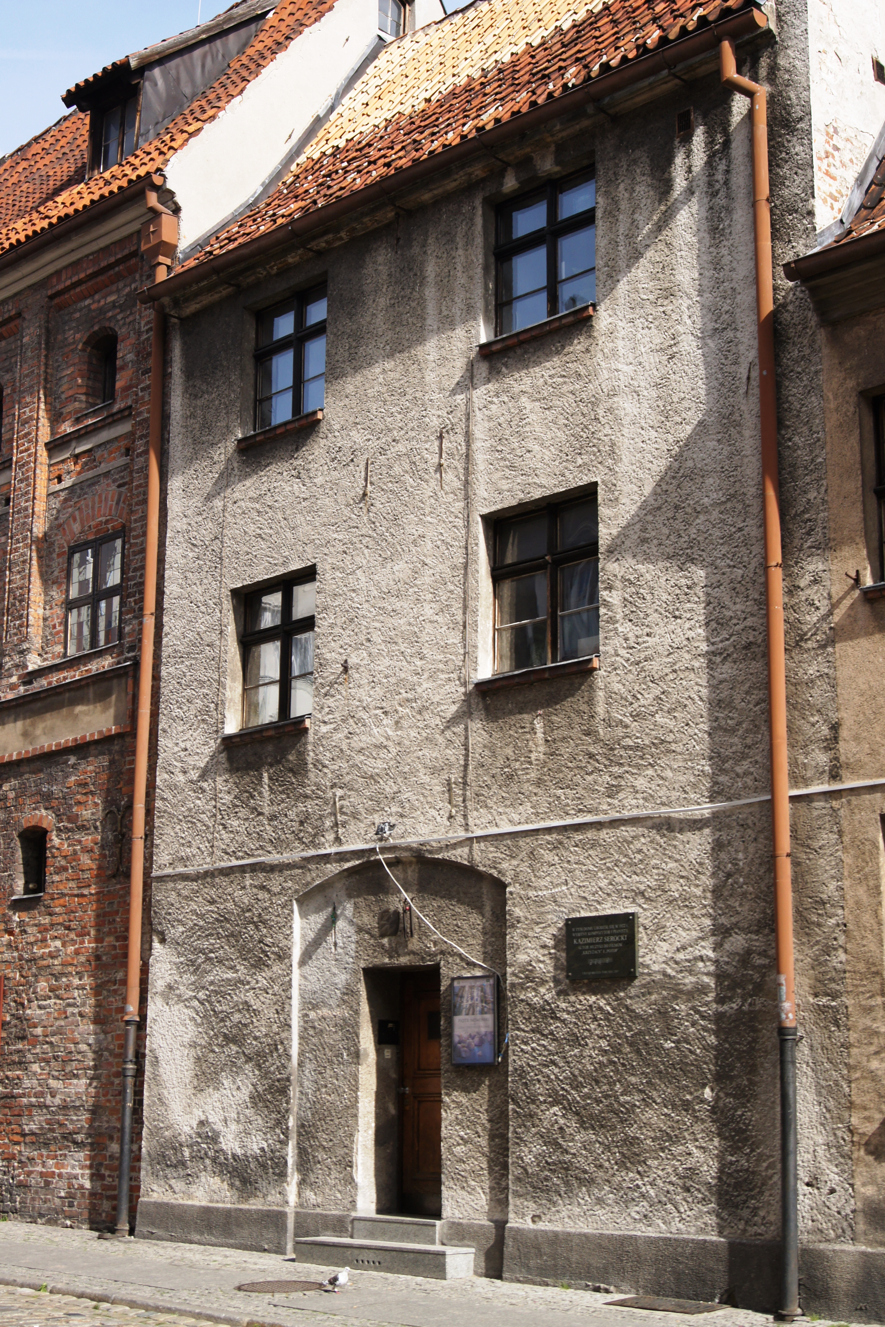 Toruń, ul. Świętego Ducha 10 - dom, XV-XIX w. (zabytek nr A/78/319 z 14.10.1971)